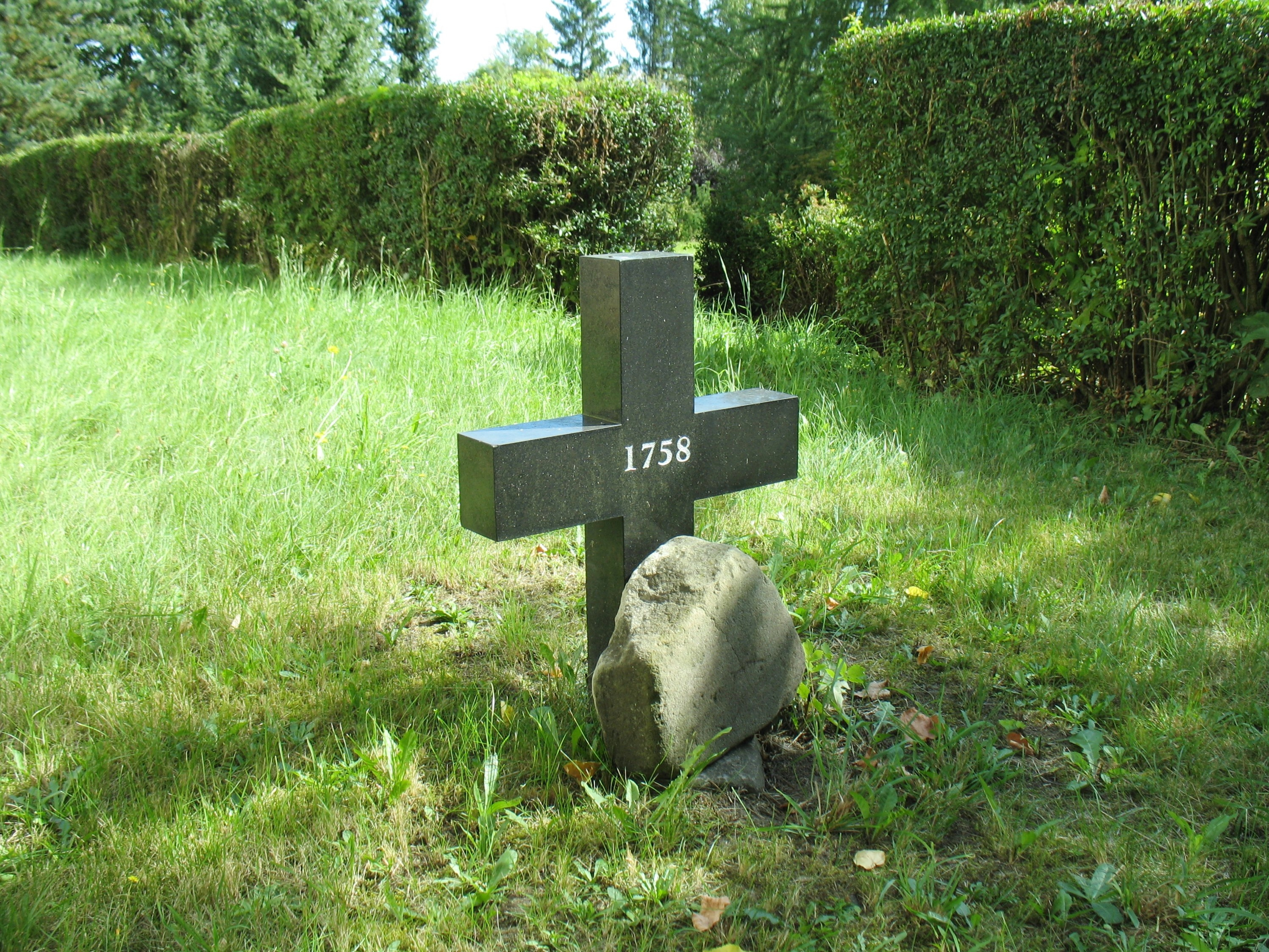 Kostel sv. Jana Nepomuckého ve Velkém Valtinově, okres Česká Lípa. Hromadný hrob pruských a rakouských vojáků, kteří padli v r. 1758 během Sedmileté války